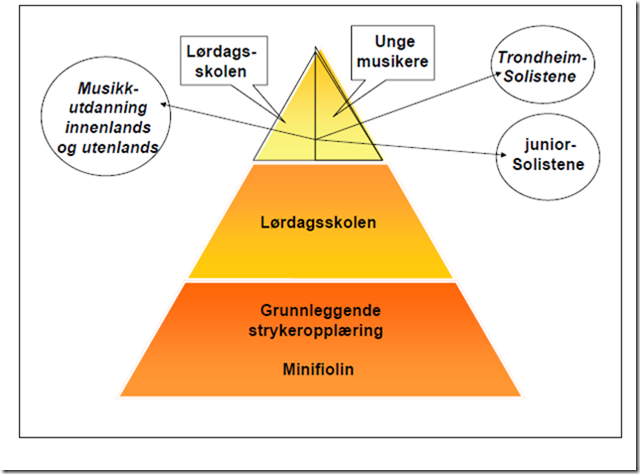 pyramiden viser oppbyggingen av strykerundervisningen fra minifiolin til høyere utdannelse